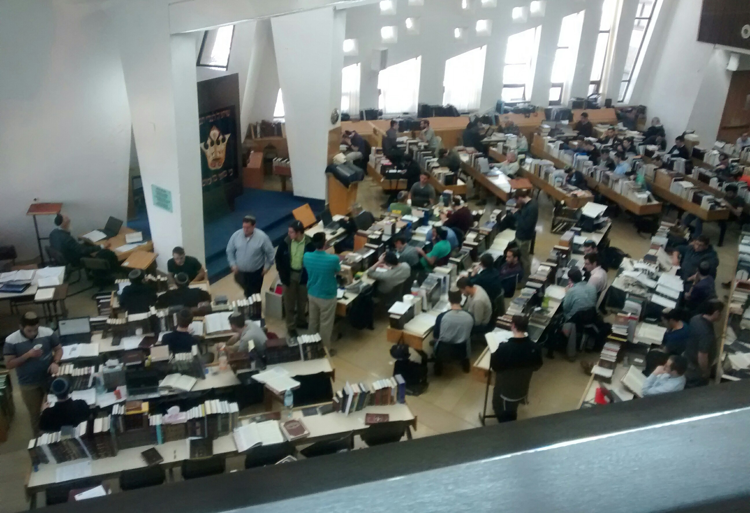 החלק הקדמי של בית המדרש בישיבת הר עציון בזמן "סדר בוקר"